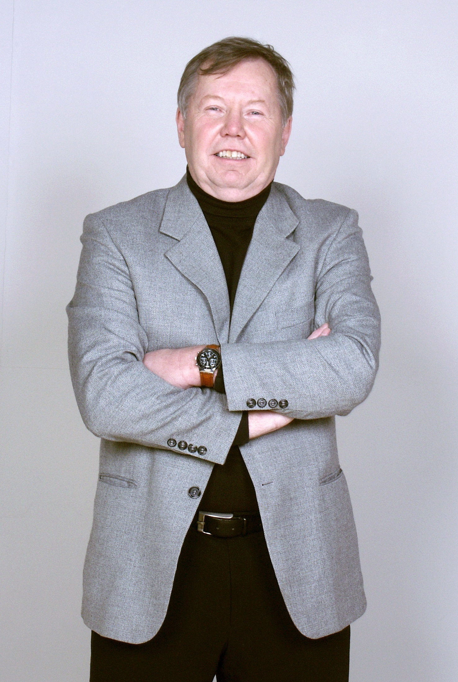 Affärsmannen Bert Karlsson.